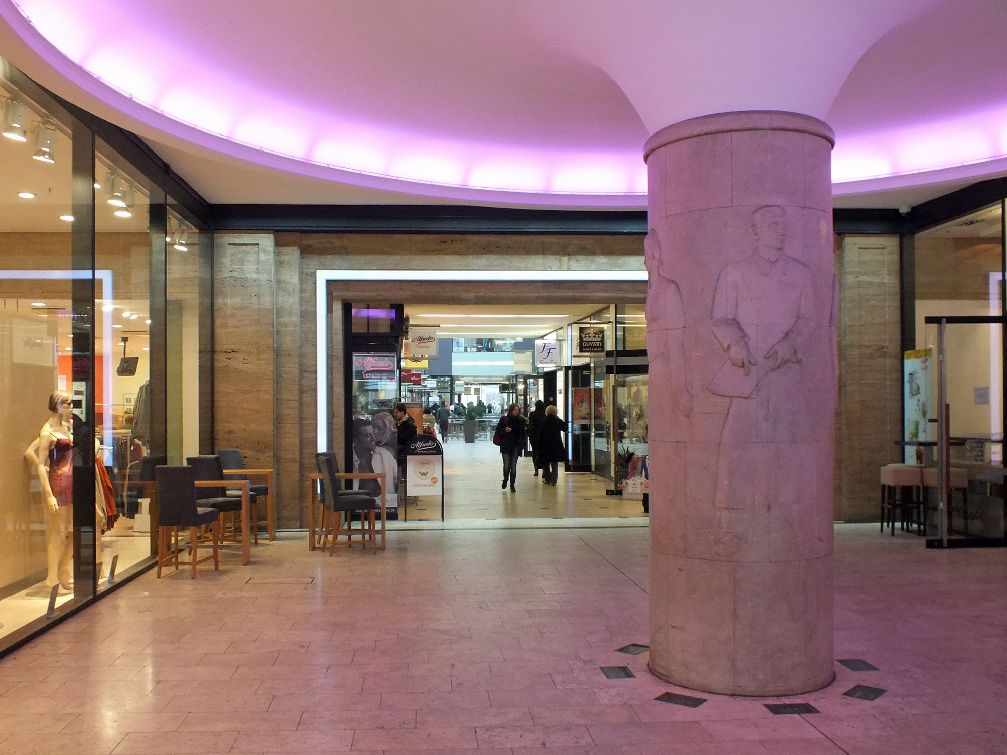 Zugang zur Messehof-Passage von der Petersstraße in Leipzig